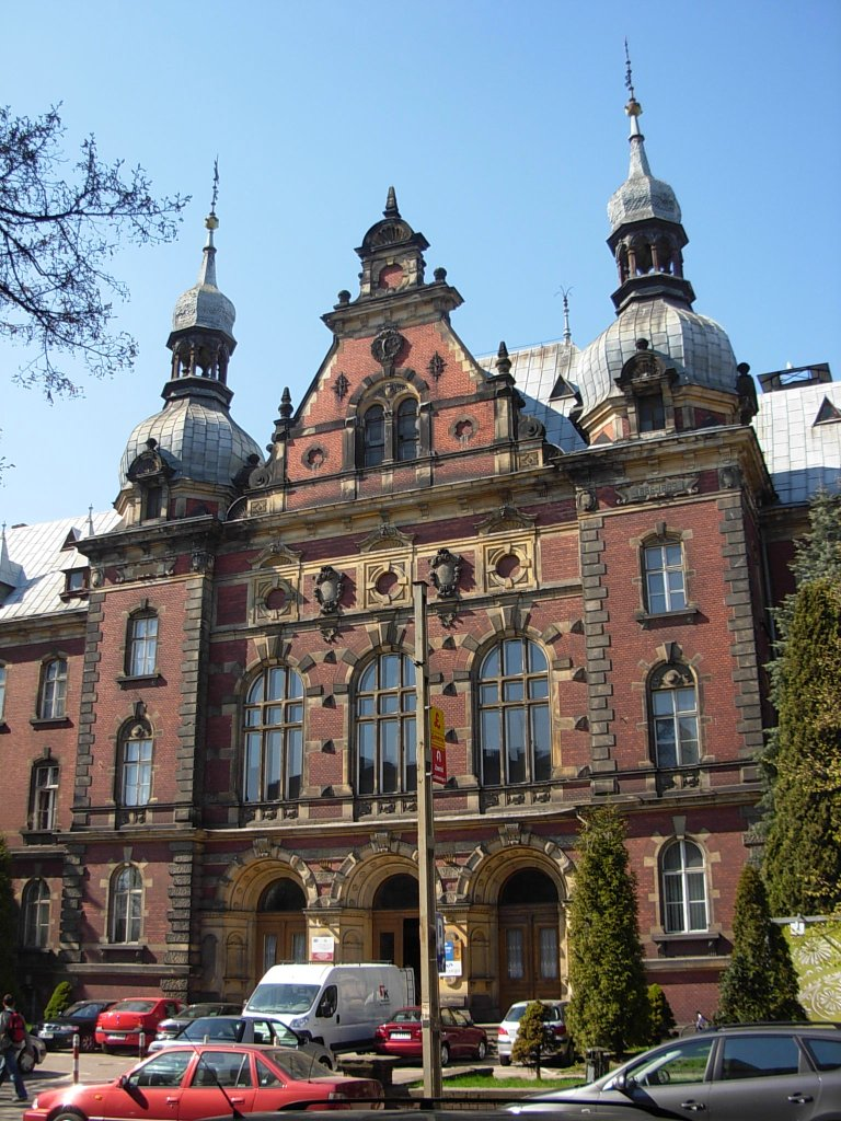 Gmach byłej Dyrekcji Kolei Wschodniej w Bydgoszczy